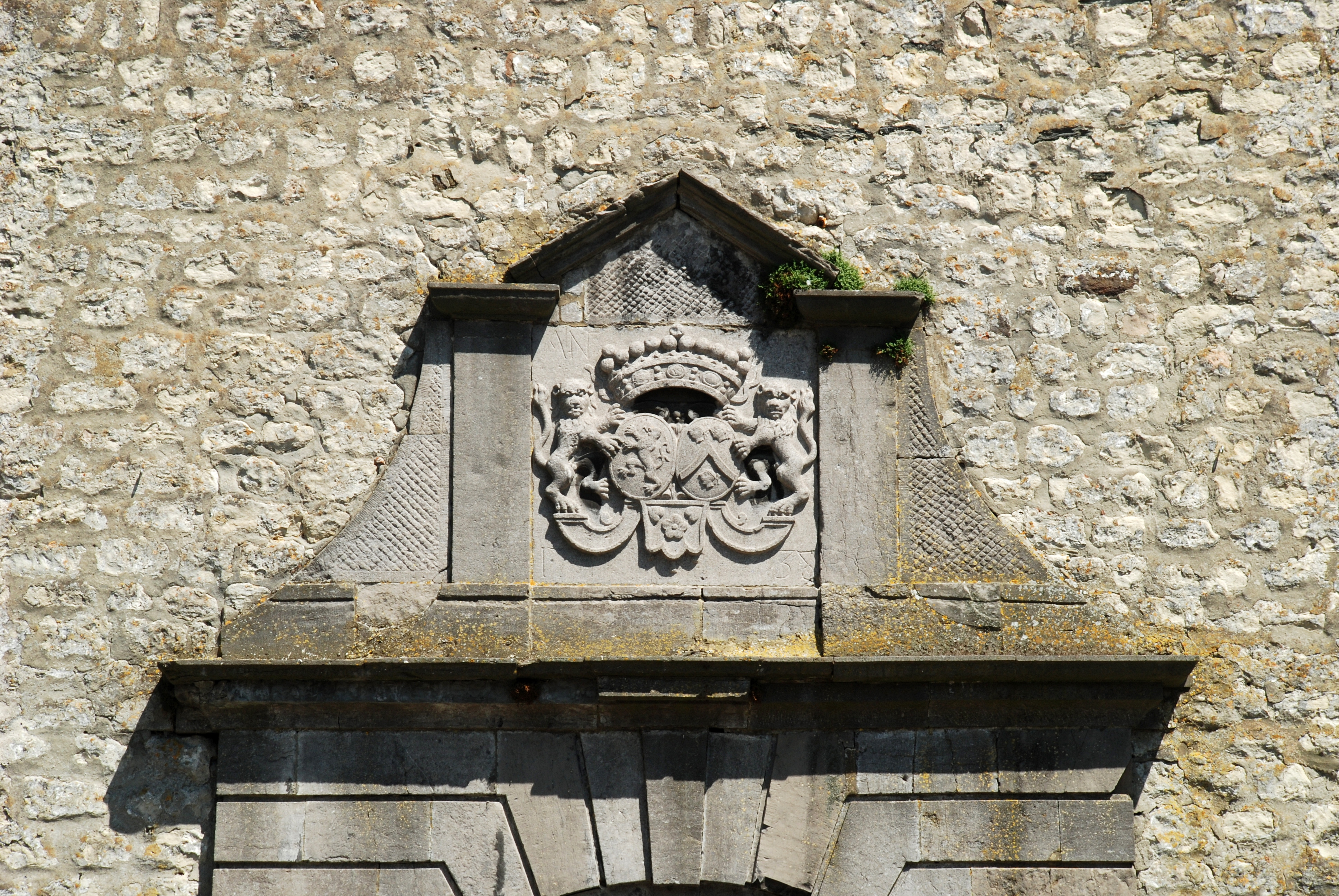 Belgique - Église Saint-Barthélémy de Bousval